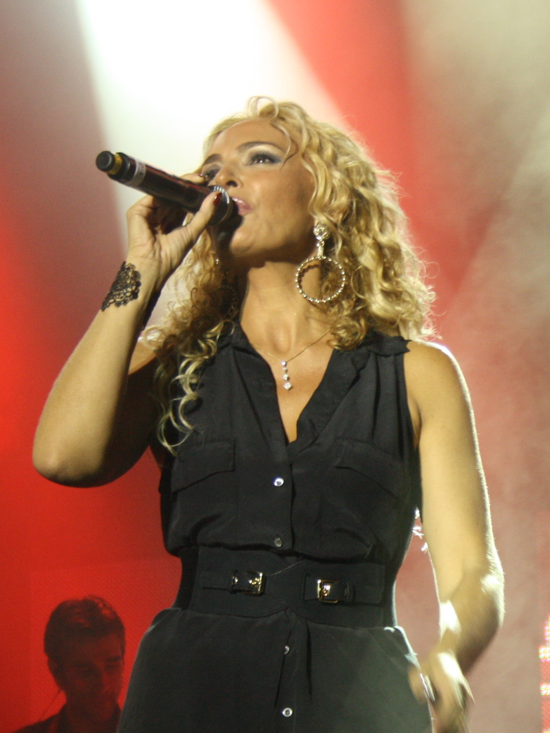 ishtar, briza festival in ashqelon, 2010